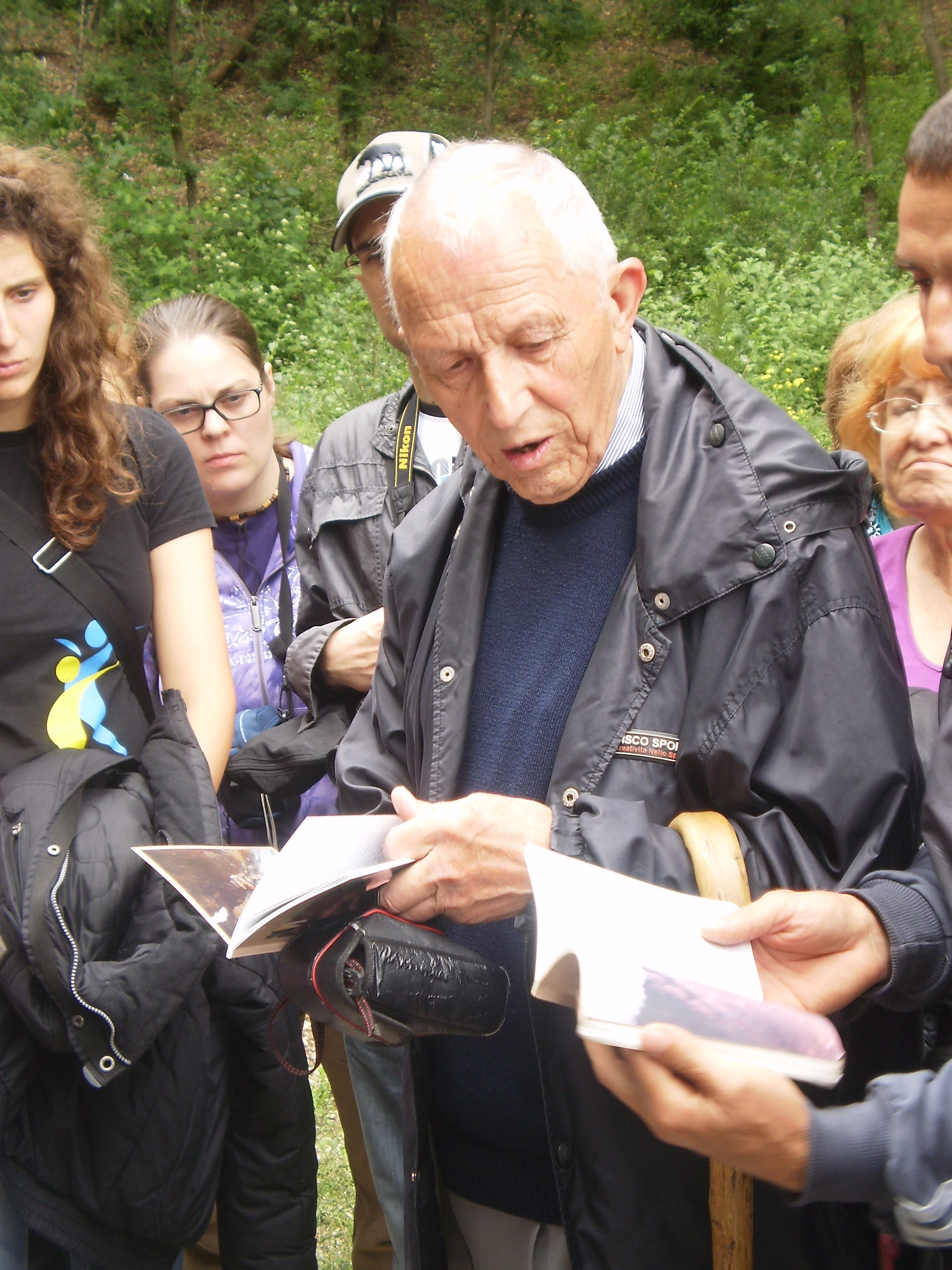 Српски (ћирилица): Професор са студентима